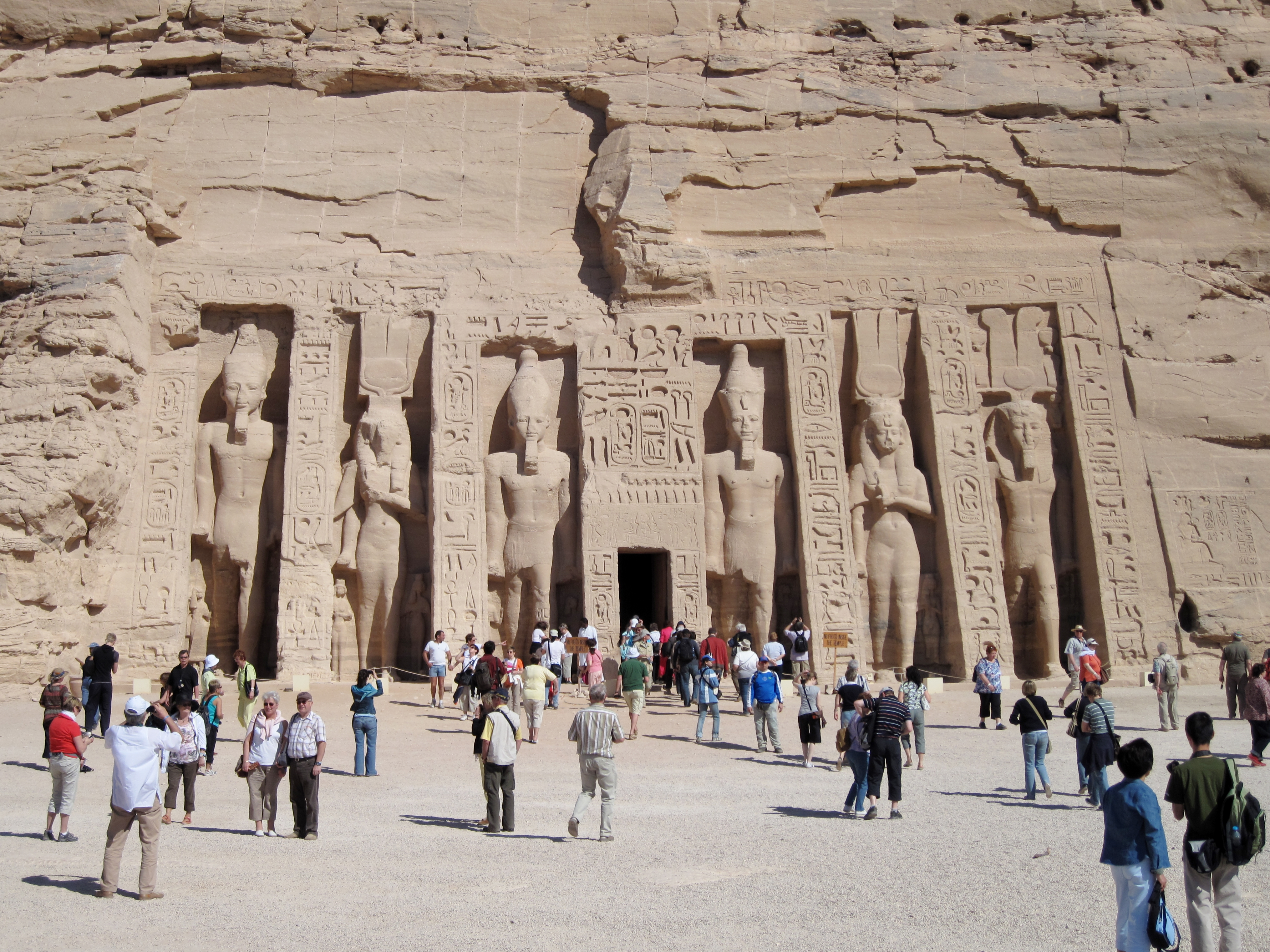 Kleiner Tempel von Abu Simbel (Hathor-Tempel oder Tempel der Nefertari), Ägypten